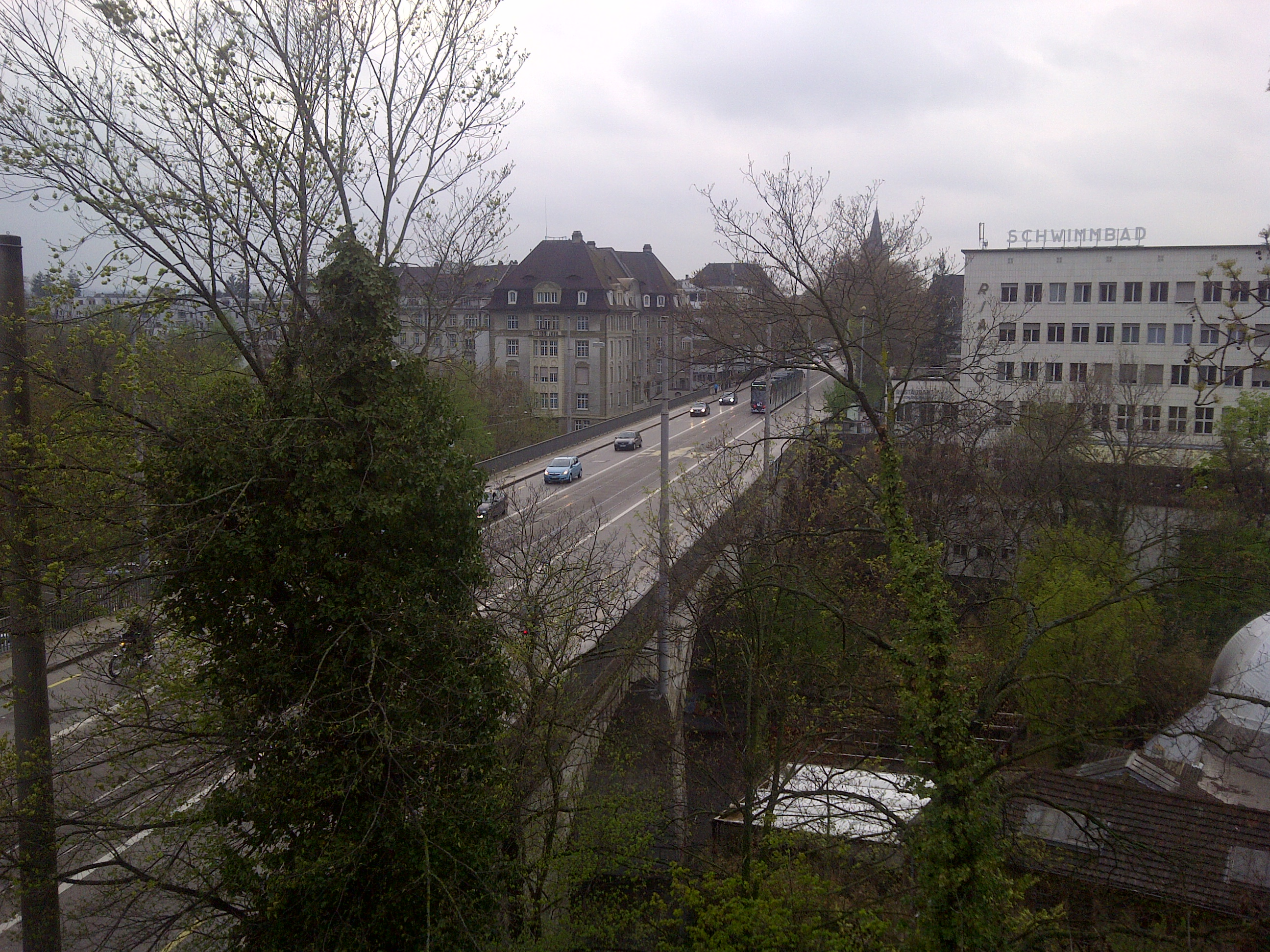 Das Birsigviadukt (Viaduktstrasse) in Basel